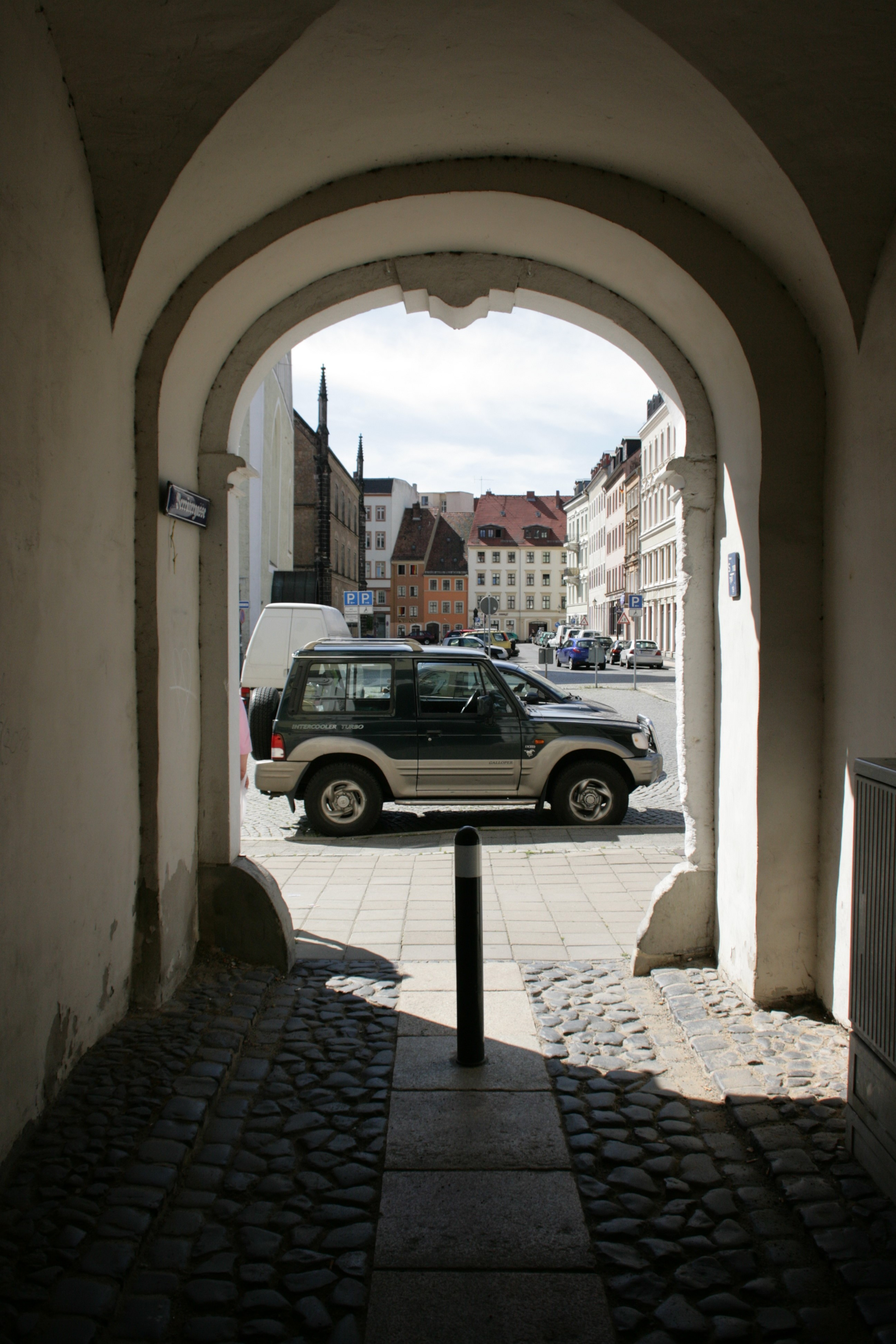 Verrätergasse in Görlitz